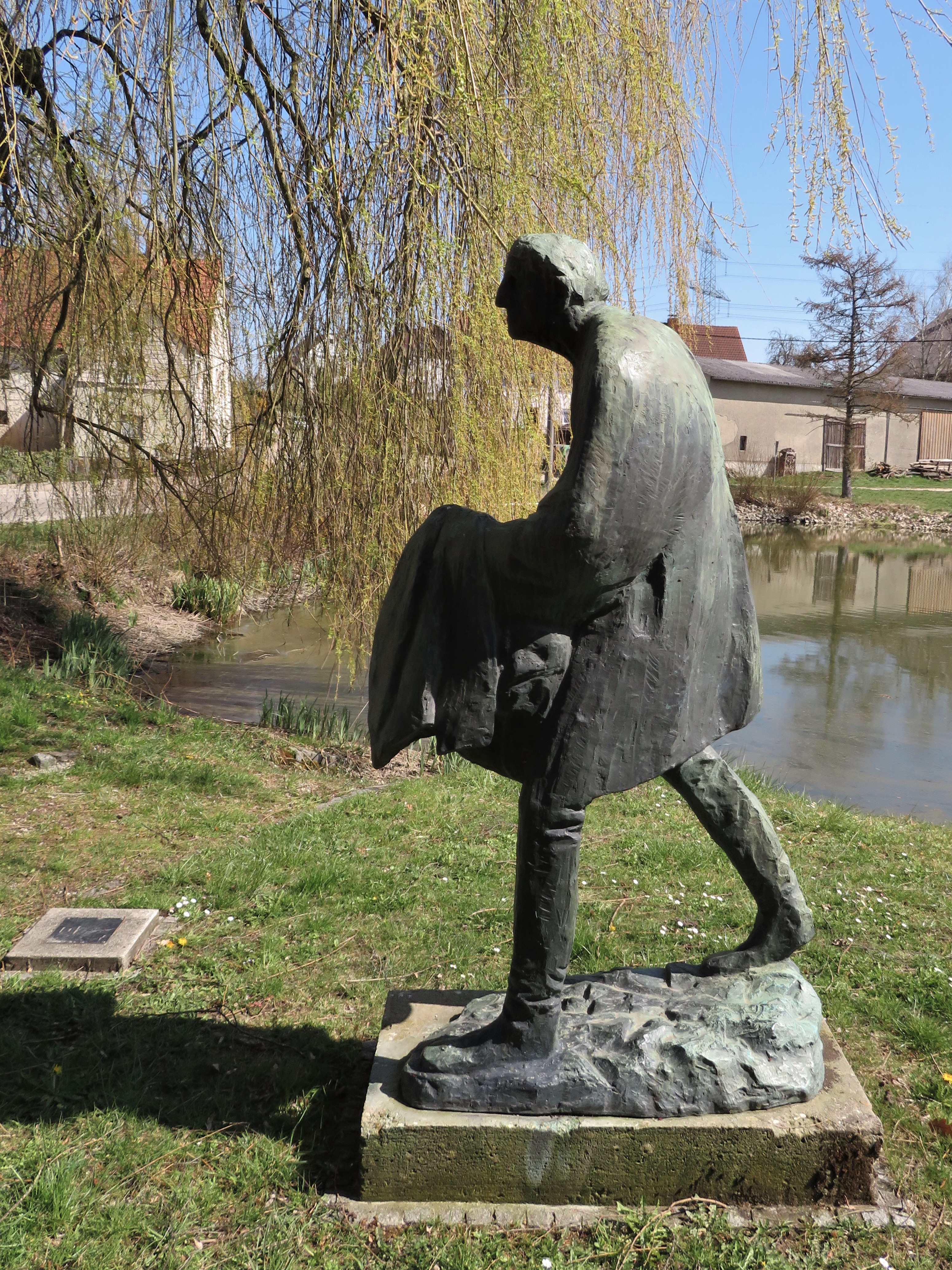 Bronzeskulptur Sämann aus dem Jahr 1957, geschaffen von dem Neu-Ulmer Bildhauer Hans Bühler; am Dorfteich Neu-Ulm/Hausen